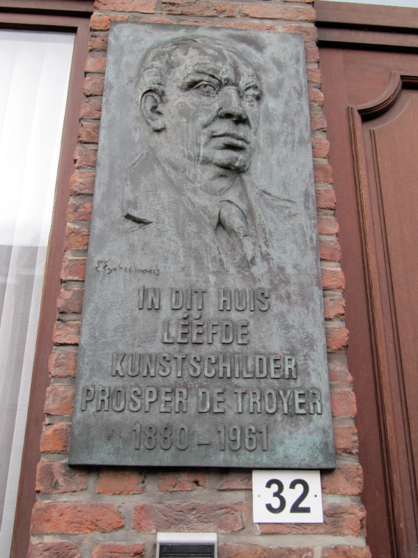 Prosper De Troyer (1880-1961), gedenkplaat aangebracht aan het huis waar hij geleefd heeft.